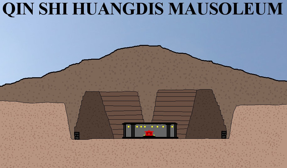 Tvärsnitt över ett tänkbart utförande av den underjordiska kammaren till Qin Shi Huangdis mausoleum. Baserat på historikern Yang Hongxuns teorier.